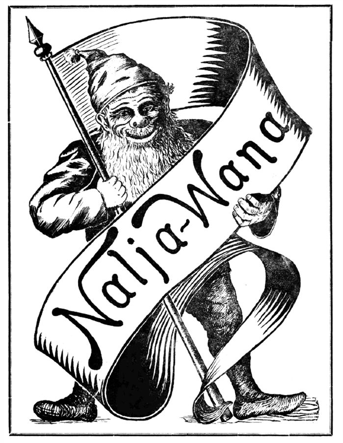 Nalja-Wana esileht